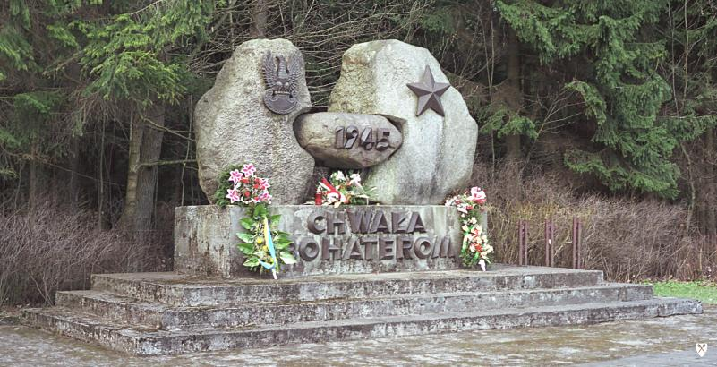 Z Łężyce - pomnik polskich żołnierzy 1 Brygady Pancernej im. Bohaterów Westerplatte i radzieckich. Kwiecień 2004r. Autor zdjęcia: Topory Licencja: GNU FDL.